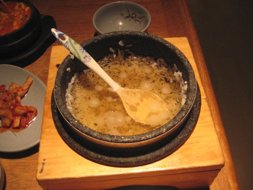 Nurungji, 누룽지